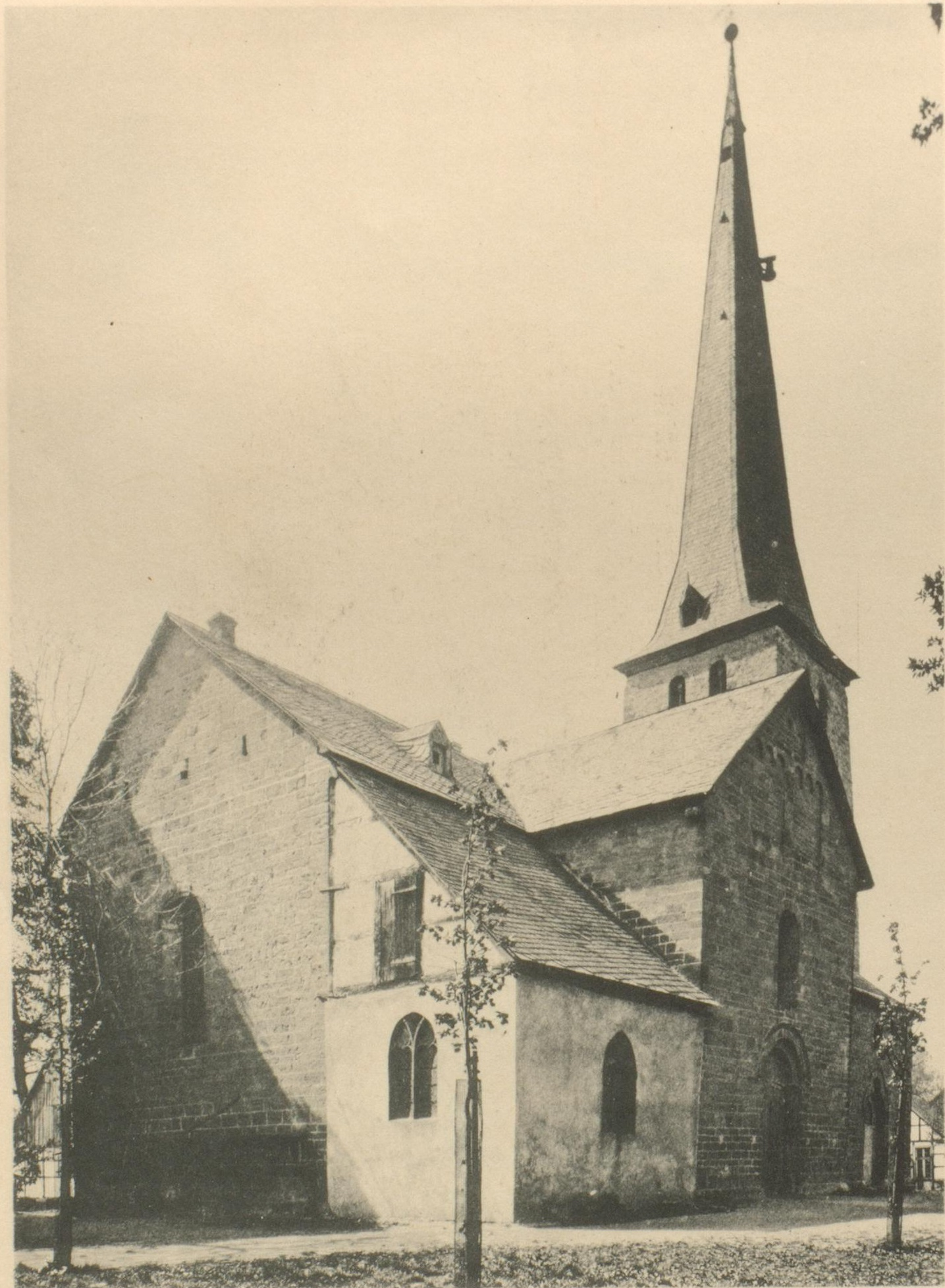 Nord-Ostseite der Dionysiuskirche in Kirchderne um 1890